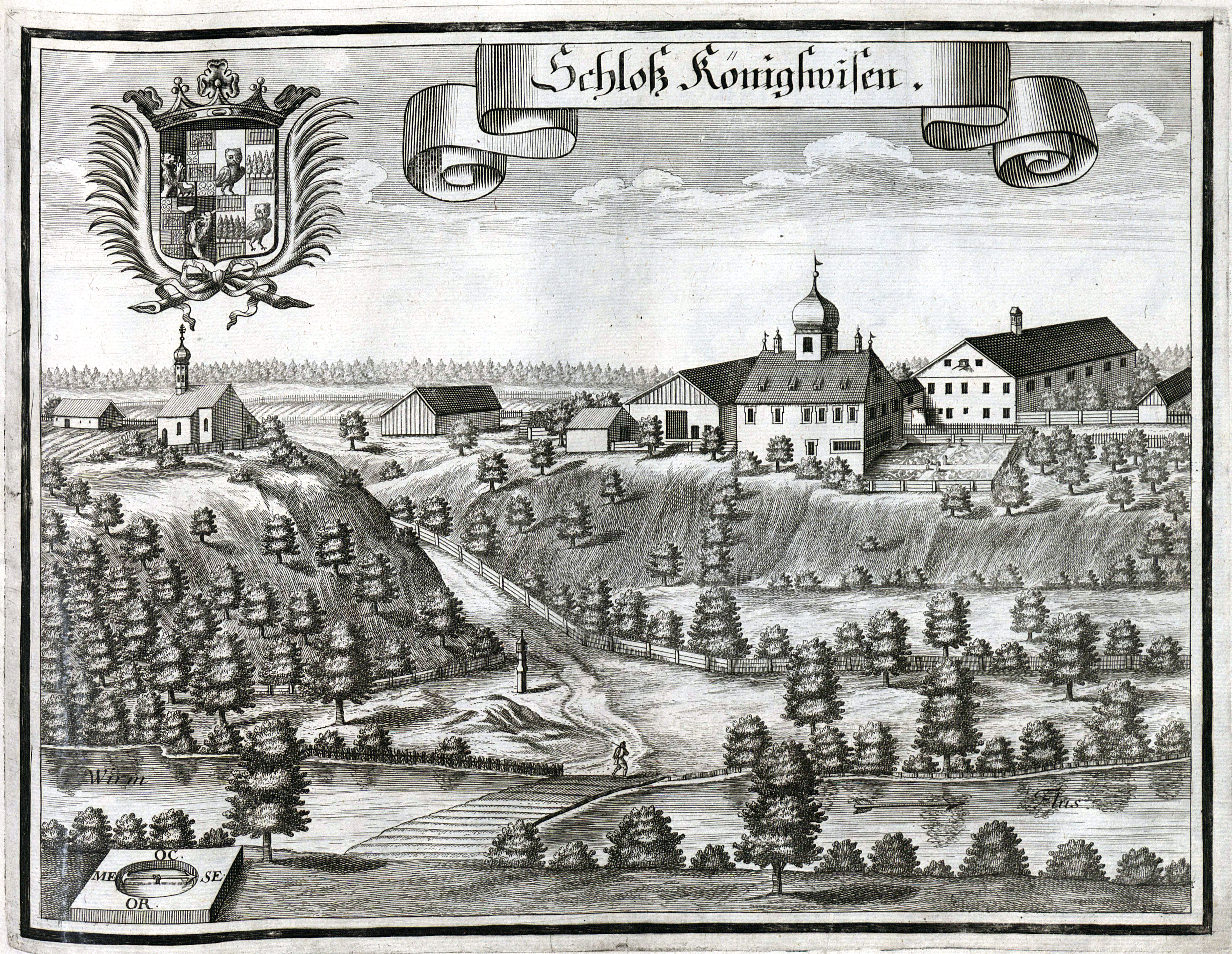 Schloss und Hofmark Königswiesen; links die Ulrichskapelle, das einzige heute noch erhaltene Bauwerk; Kupferstich von Michael Wening